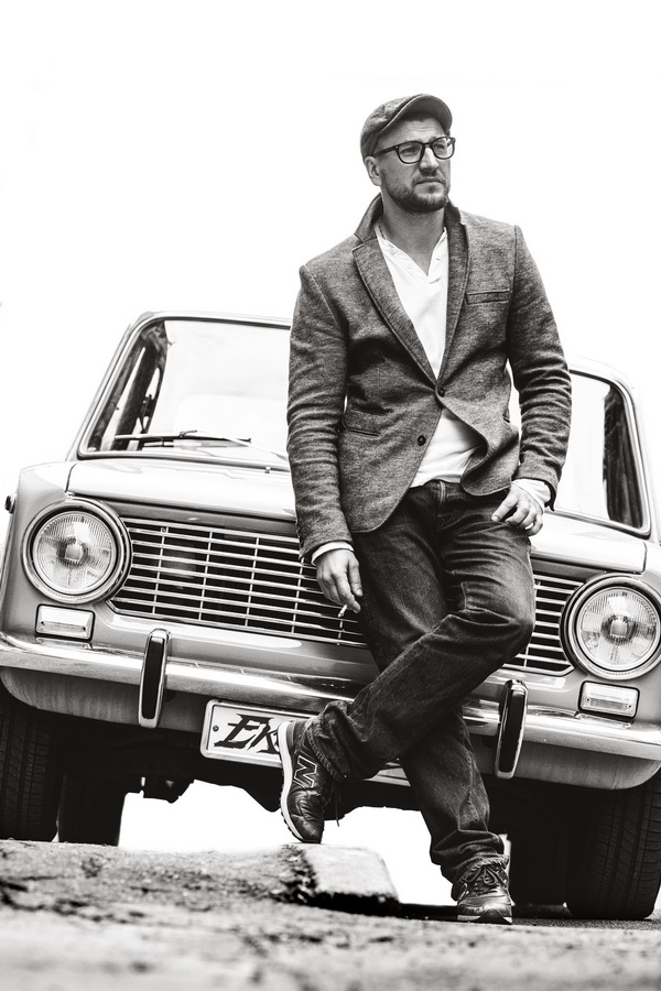 Александр Устюгов